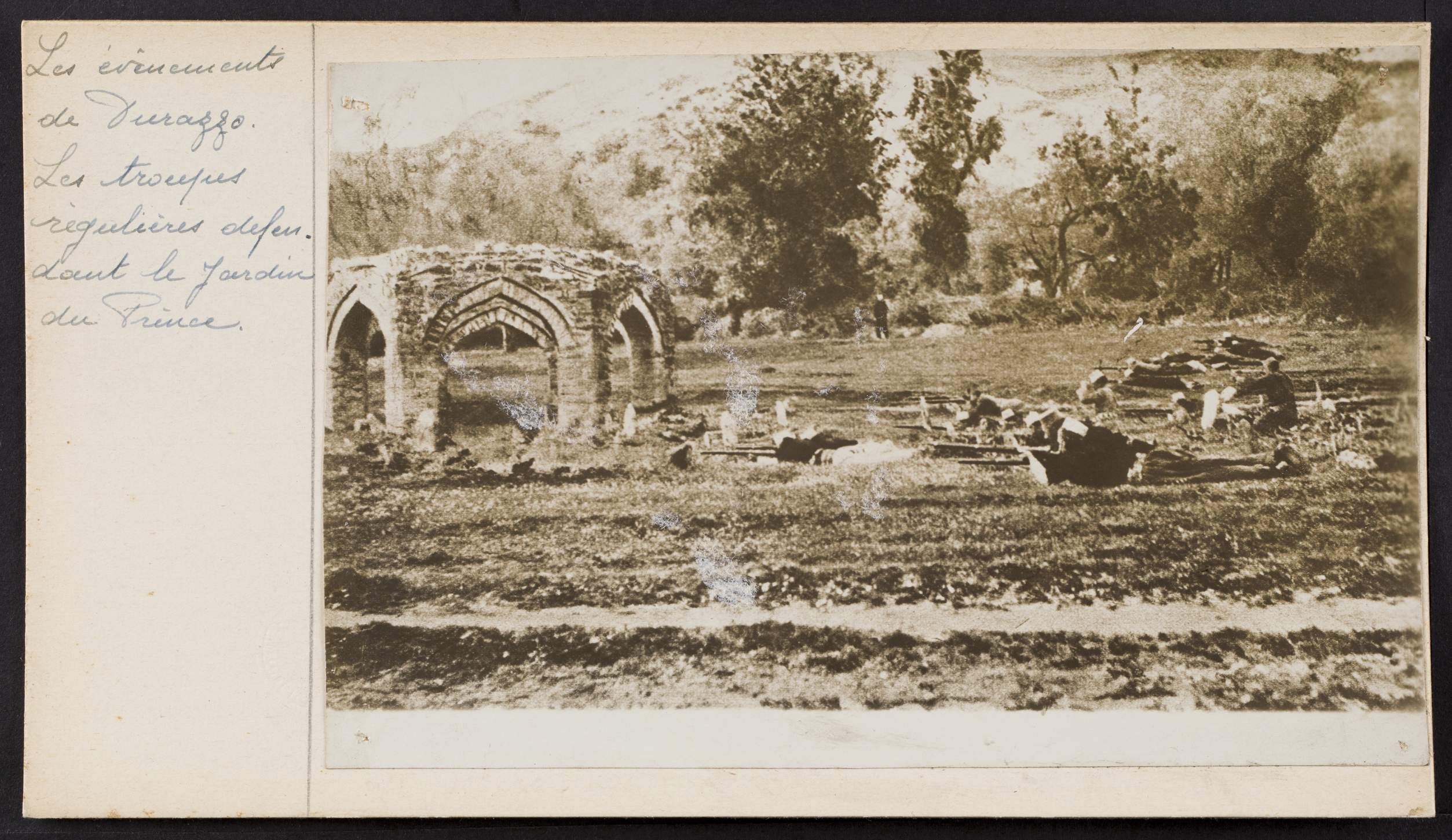 Les événements de Durazzo. Les troupes régulières défendent le jardin du prince.